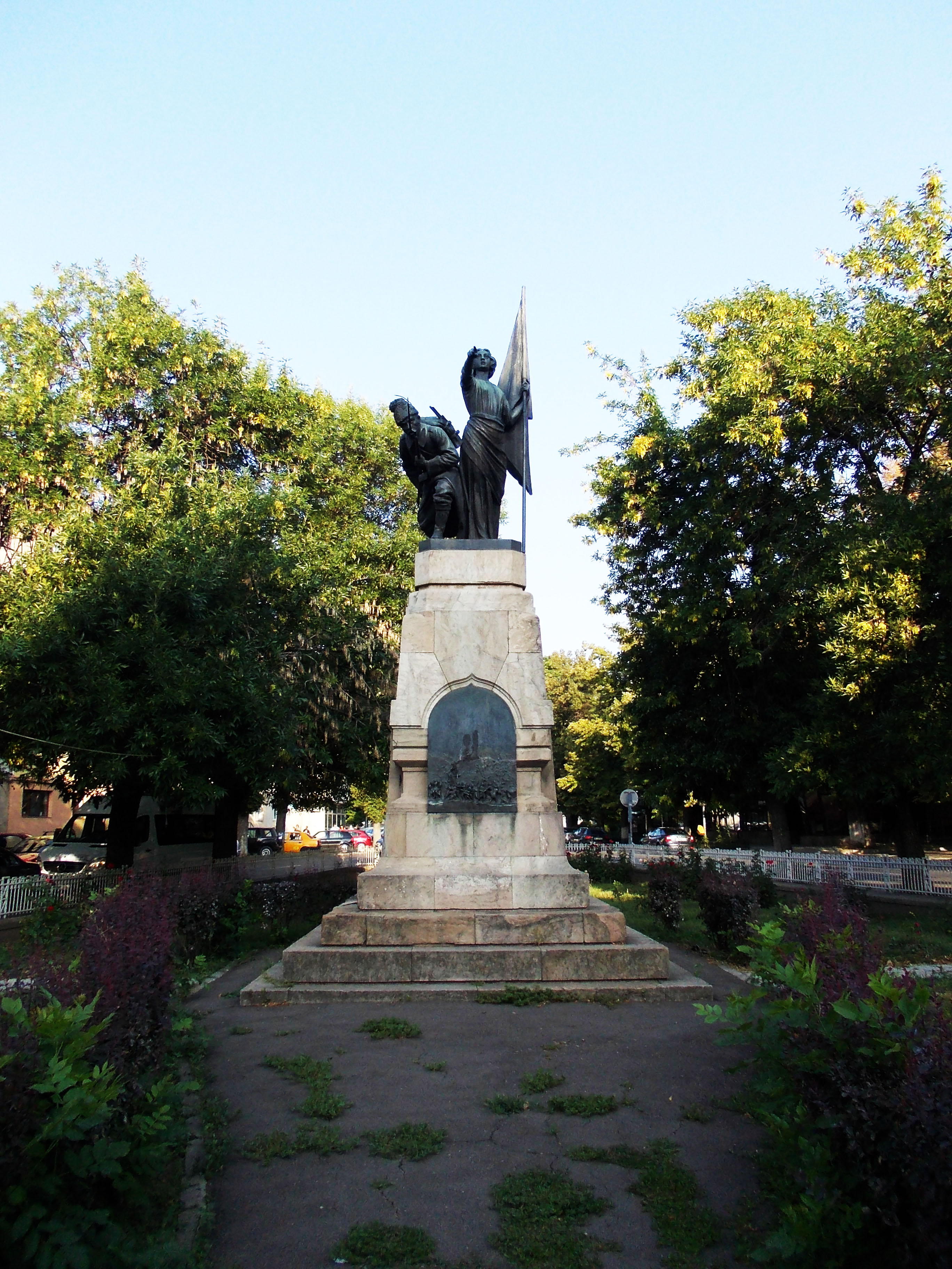 Vedere frontală